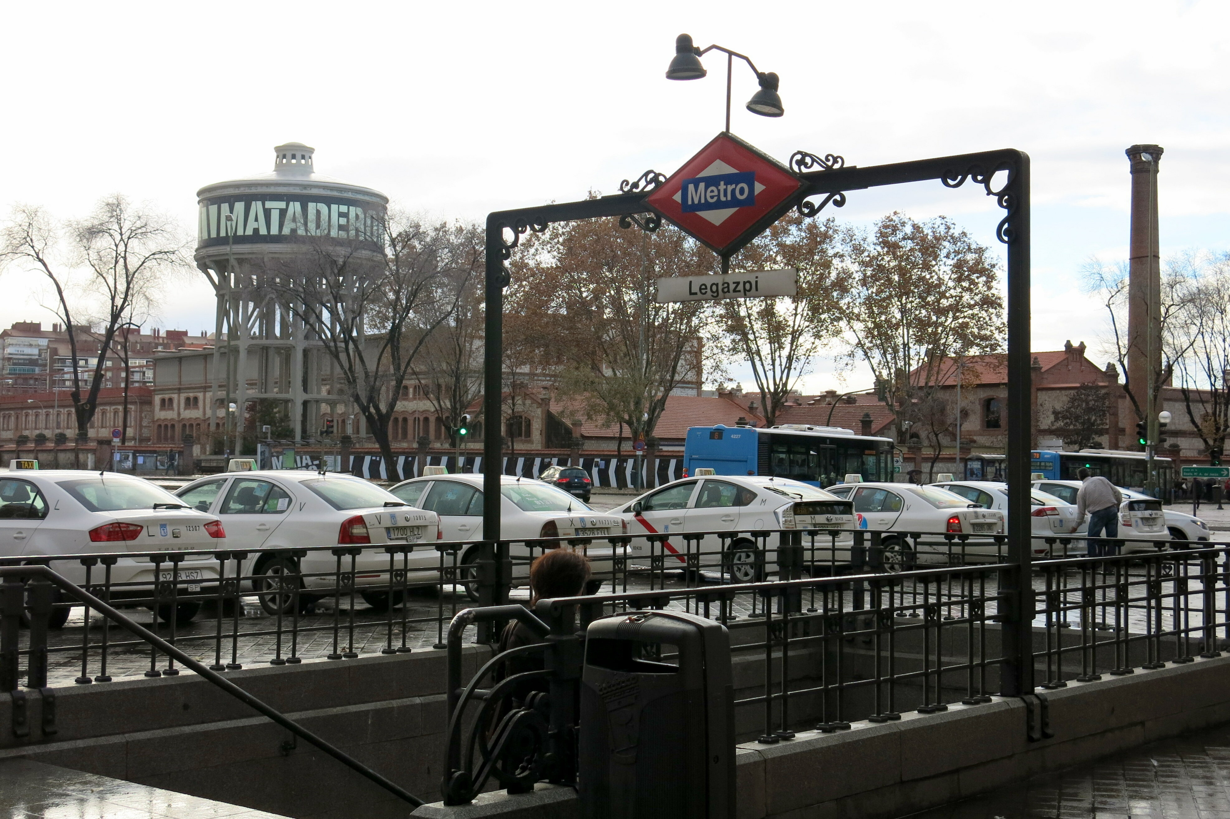 plaza de Lagazpi